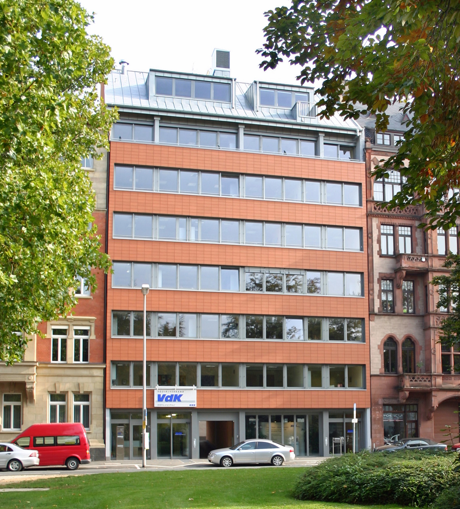 Die Geschäftsstelle des Landesverbandes in Mainz.